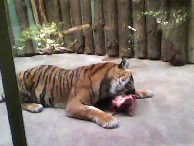 sumatranski tigar u praškom zoološkom vrtu